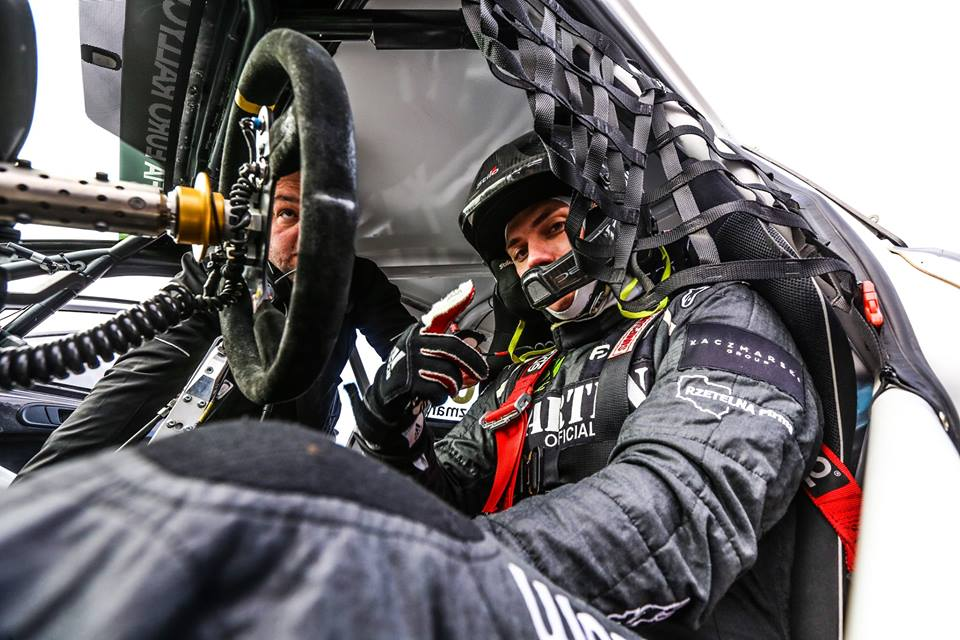 Martin w Fieście ST RX